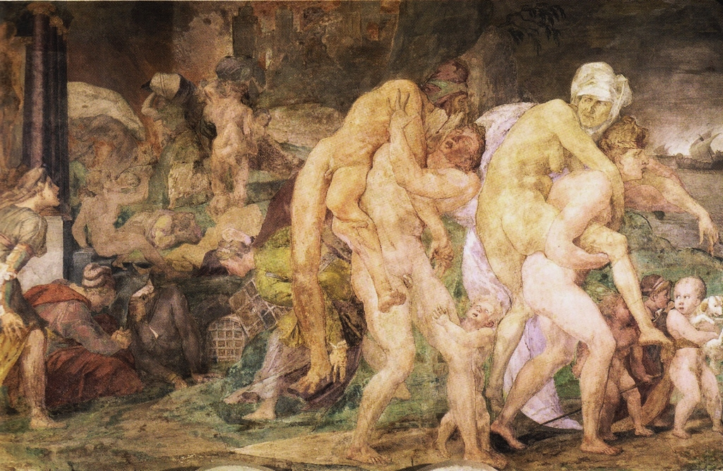 Galleria di Francesco I, fratelli di Catania